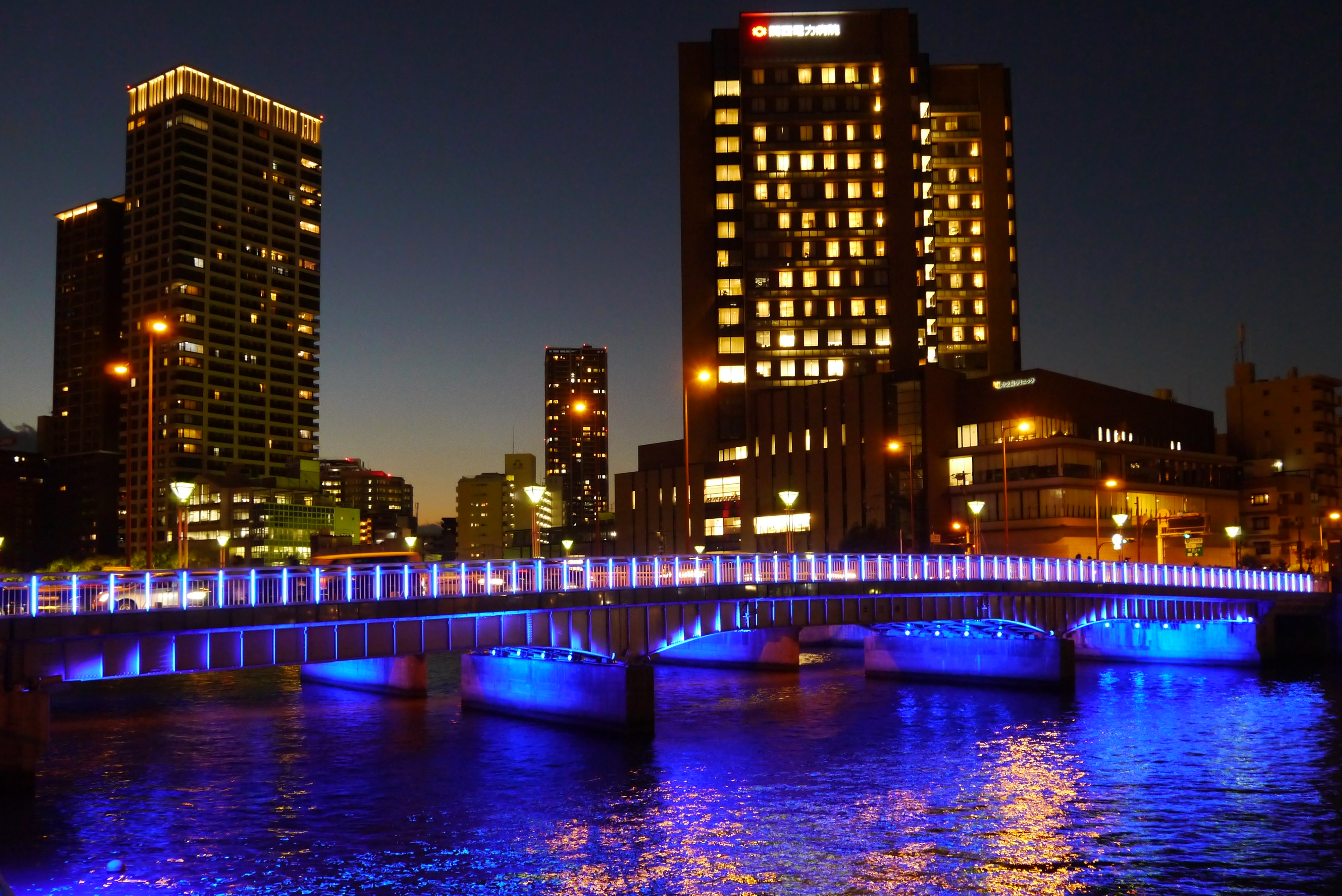 Nakanoshima (中之島 (大阪府)), Osaka, Osaka prefecture, Japan